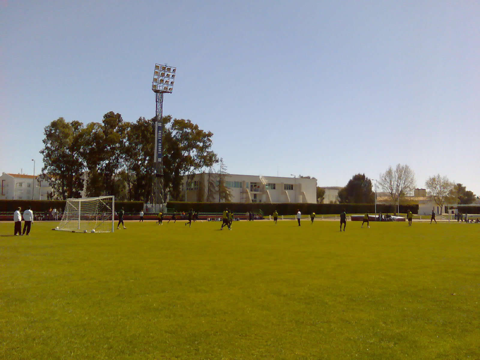 Treinos da selecção portuguesa de sub-21 em Beja